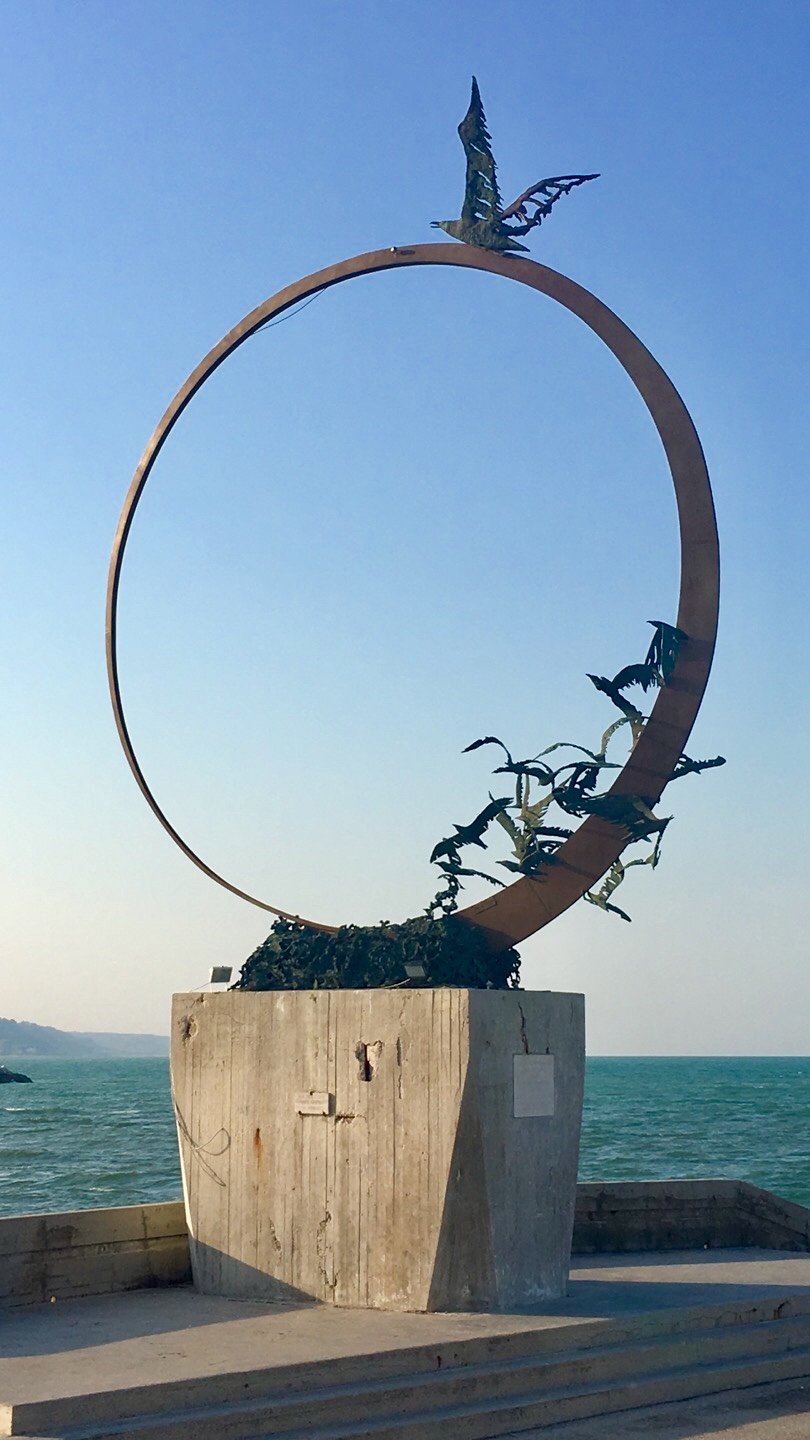 San Benedetto Del Tronto This is a photo of a monument which is part of cultural heritage of Italy.